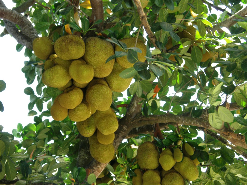 Artocarpus heterophyllus, Zahlreiche Früchte am Baum